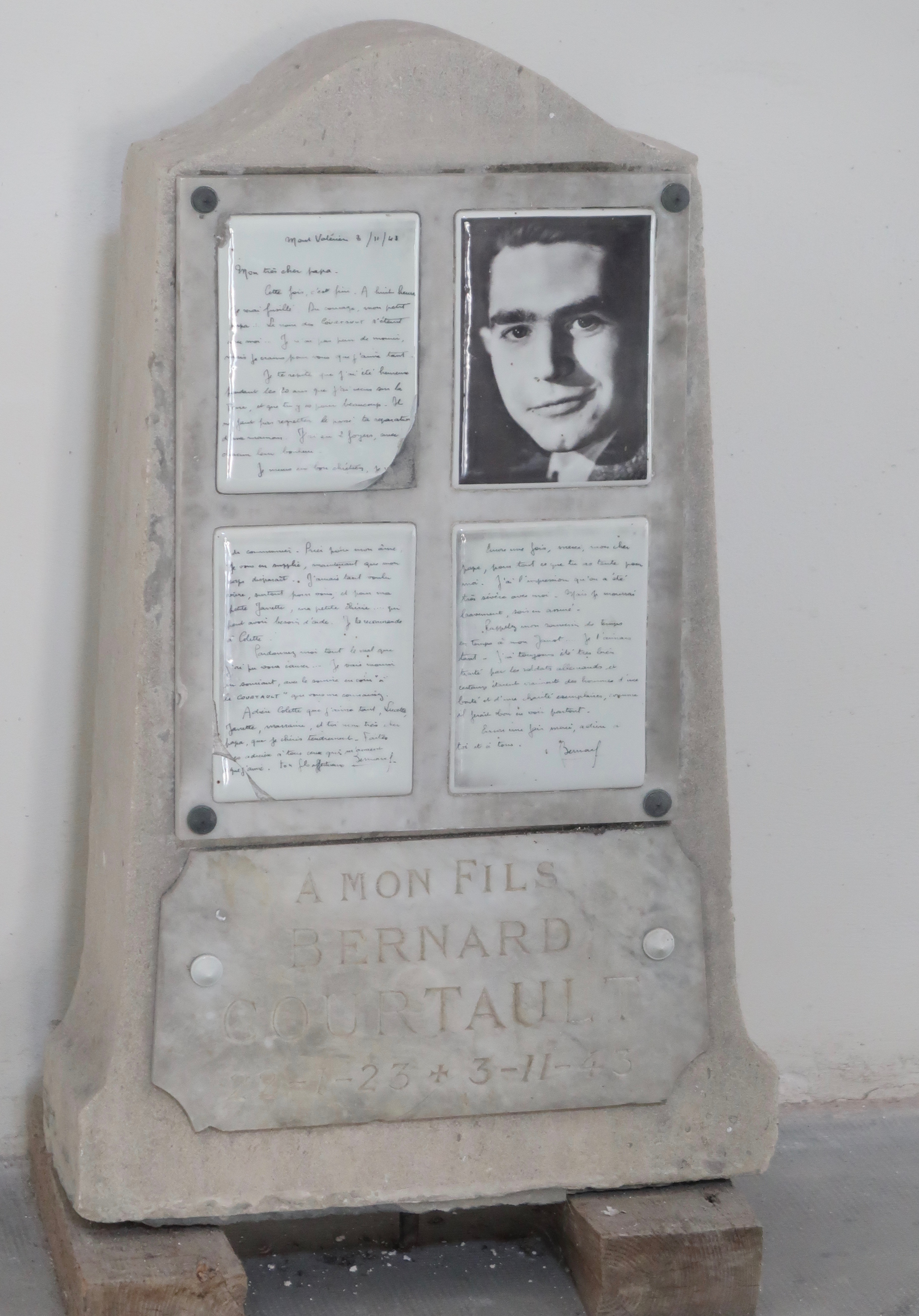 Plaque et monument en hommage à Bernard Courtault dans la chapelle des fusillés du mont Valérien (Suresnes, Hauts-de-Seine).